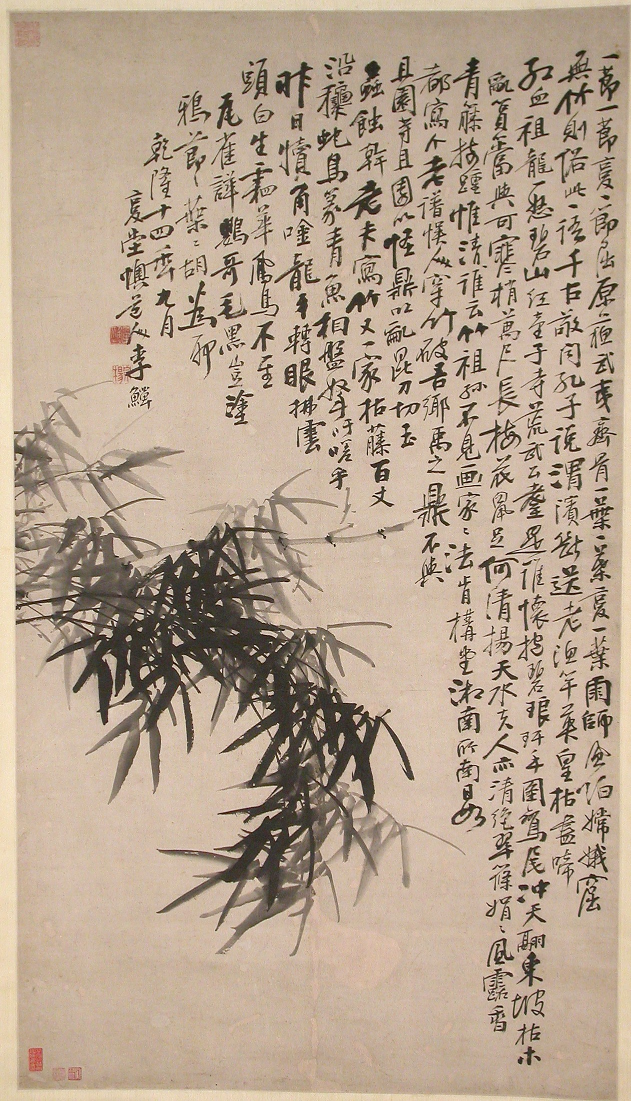 China; Hanging scroll; Paintings